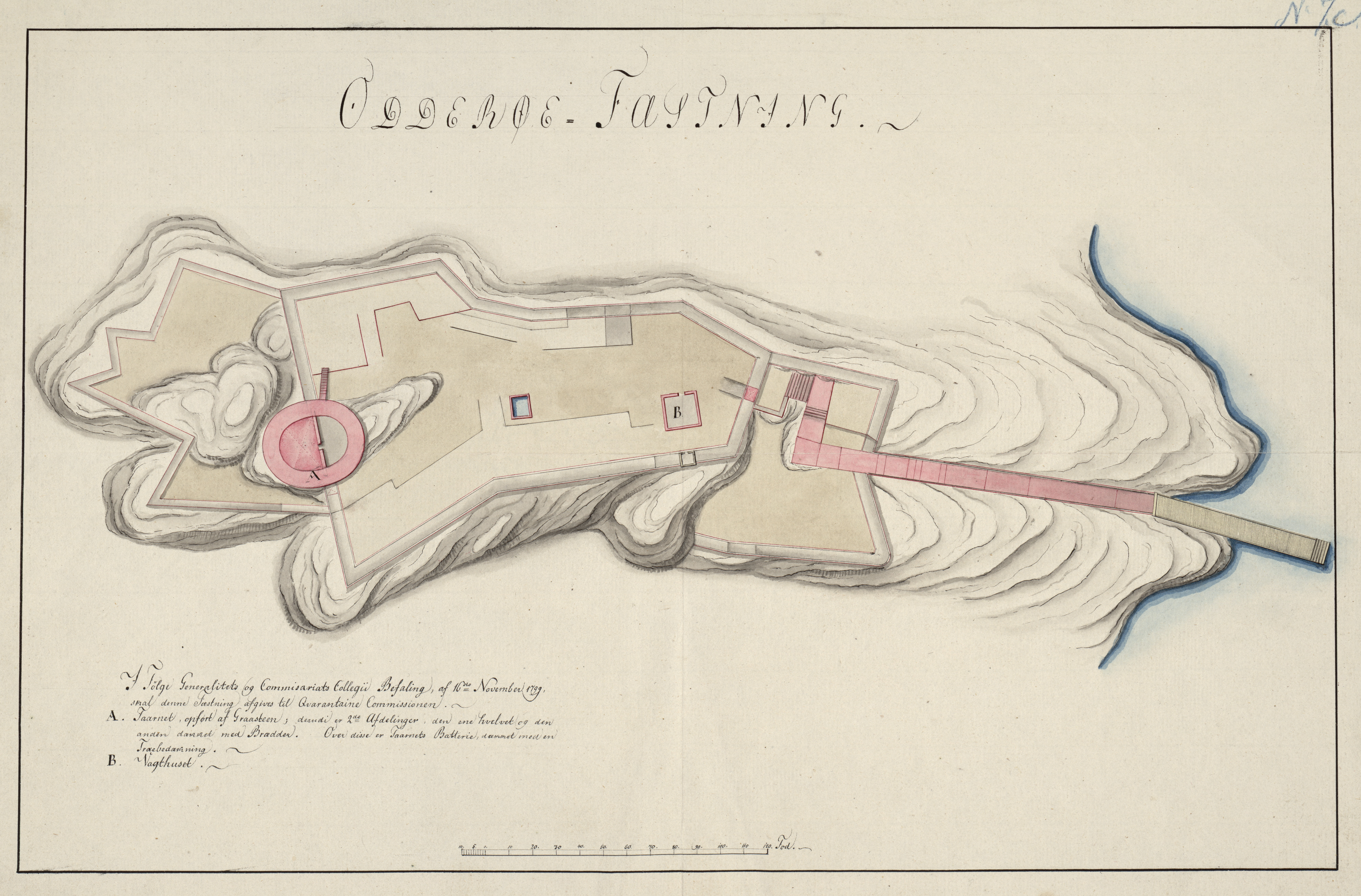 Kart fra Nasjonalbibliotekets kartsamling. Kartet er gitt ut i håndtegnet (ca 1800?) og viser Odderøya festning.